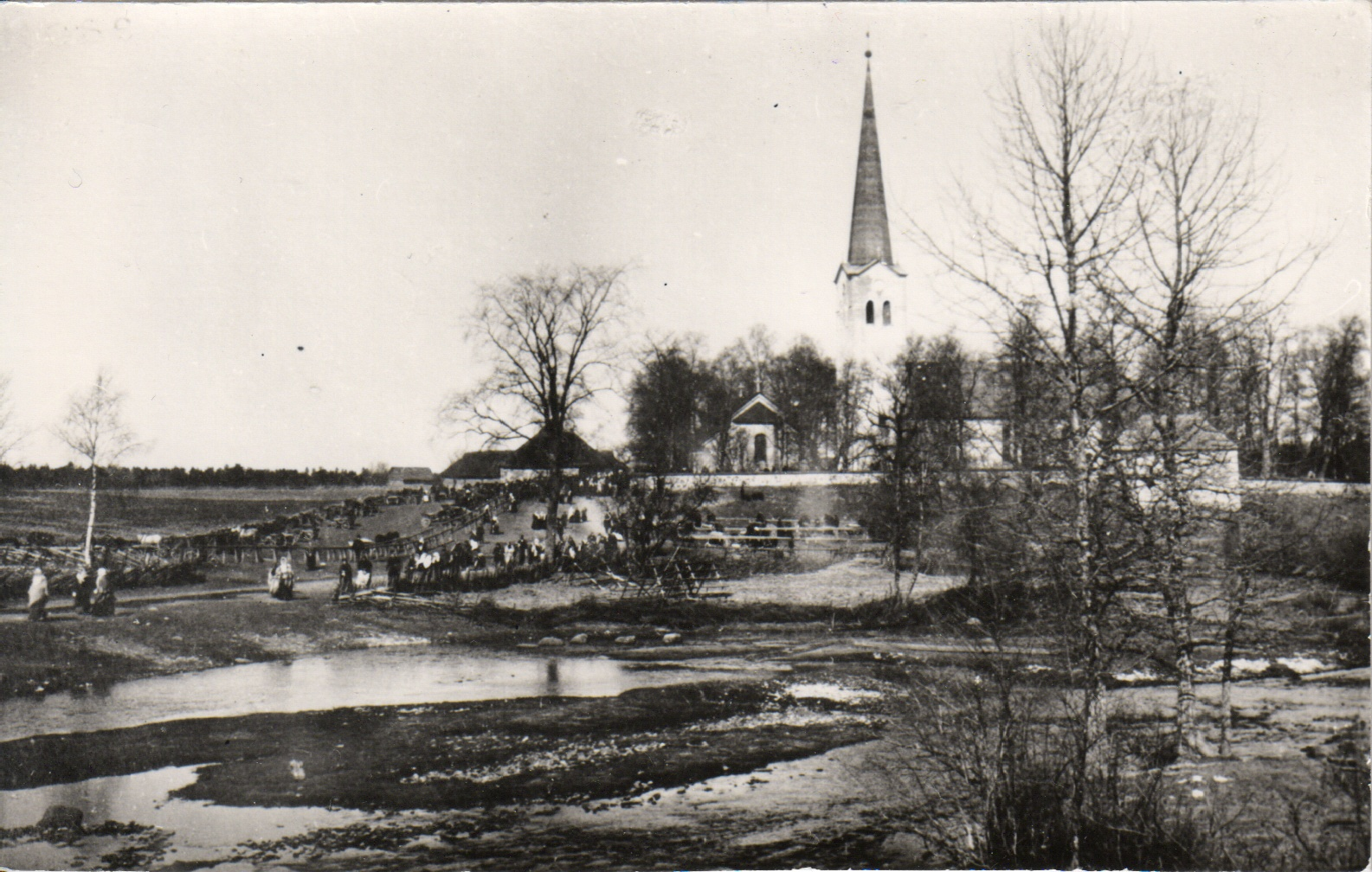 Kose kirik. Pildil on näha laadaplats kirikumäe all, Kose kirik koos mõlema kabeliga ja jupp Pirita jõge.